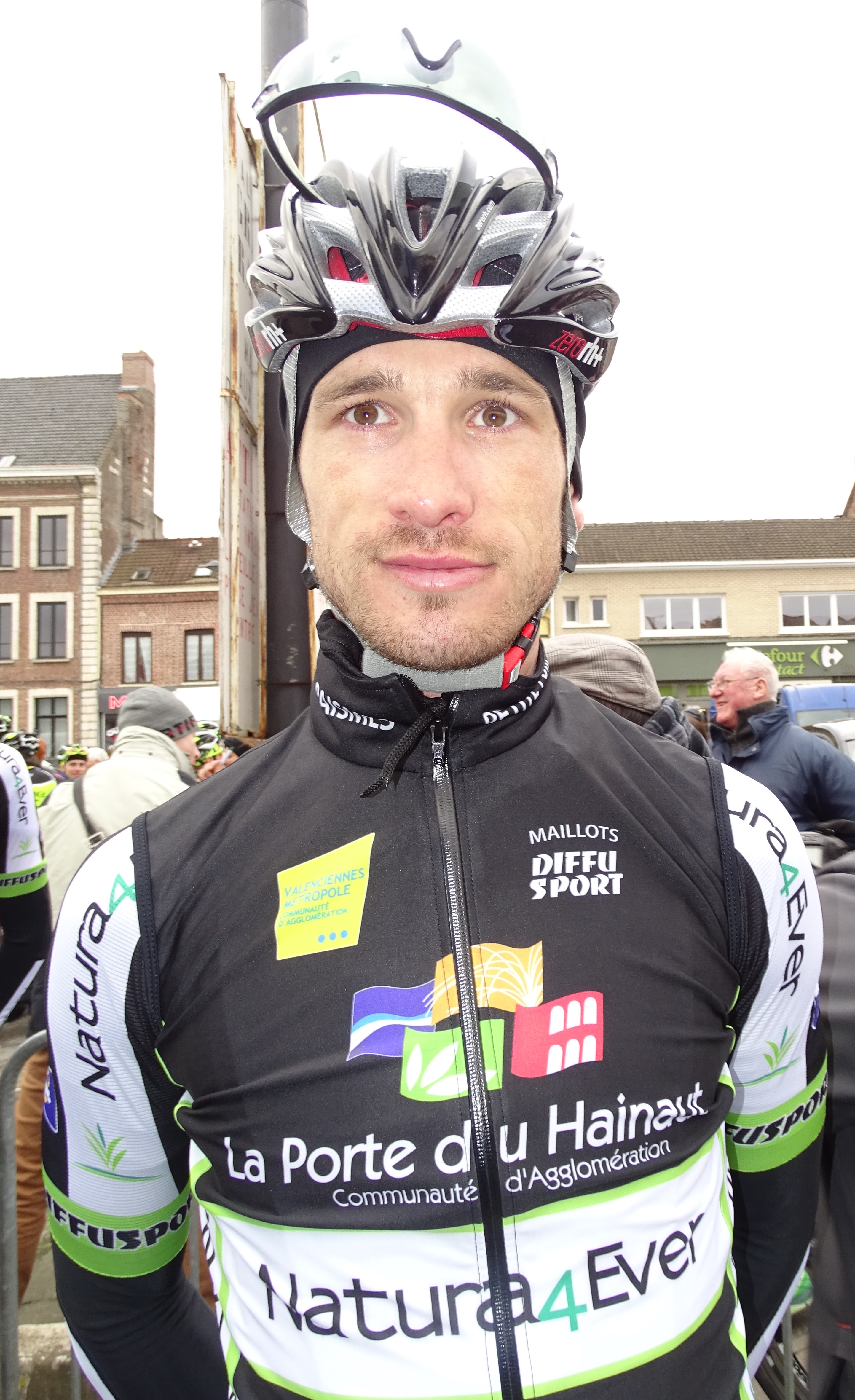 Reportage réalisé le dimanche 6 mars à l'occasion du départ et de l'arrivée du Grand Prix de Lillers-Souvenir Bruno Comini 2016 à Lillers, Pas-de-Calais, Nord-Pas-de-Calais, France.